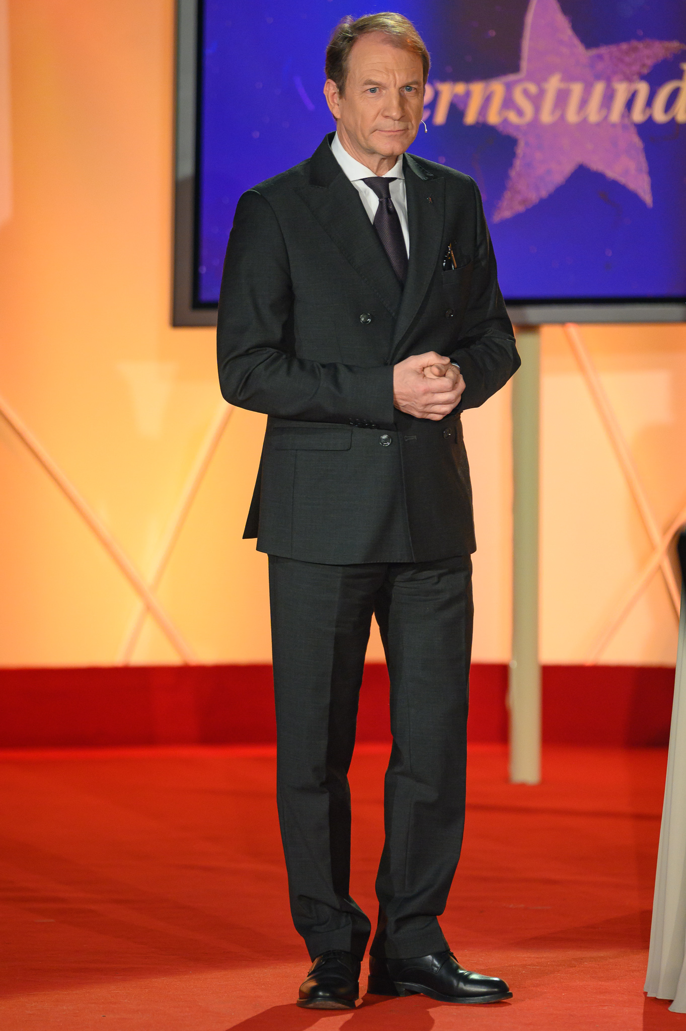 BR,Bayerisches Fernsehen,Frankenhalle,Live-Sendung,Sternstunden-Gala,Sternstundengala,Thomas Jansing